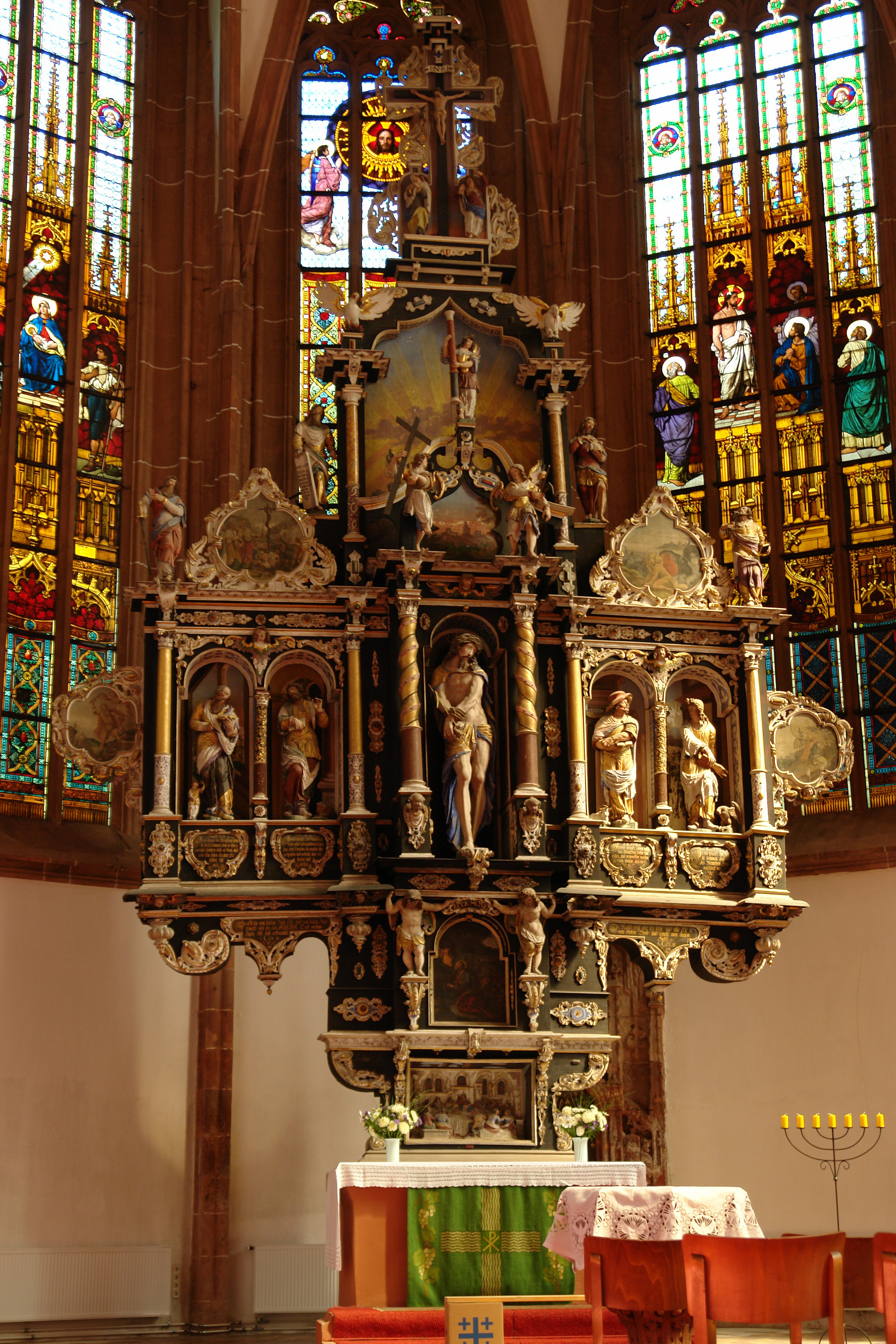 Mittweida Pfarrkirche2-Altar